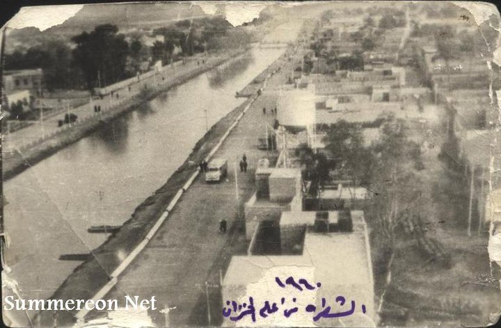 الشطرة قديما في عام 1960